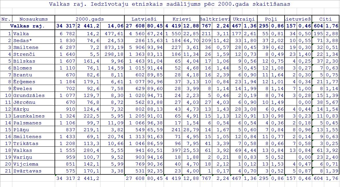 результаты переписи населения Латвии ни 01.04.2000